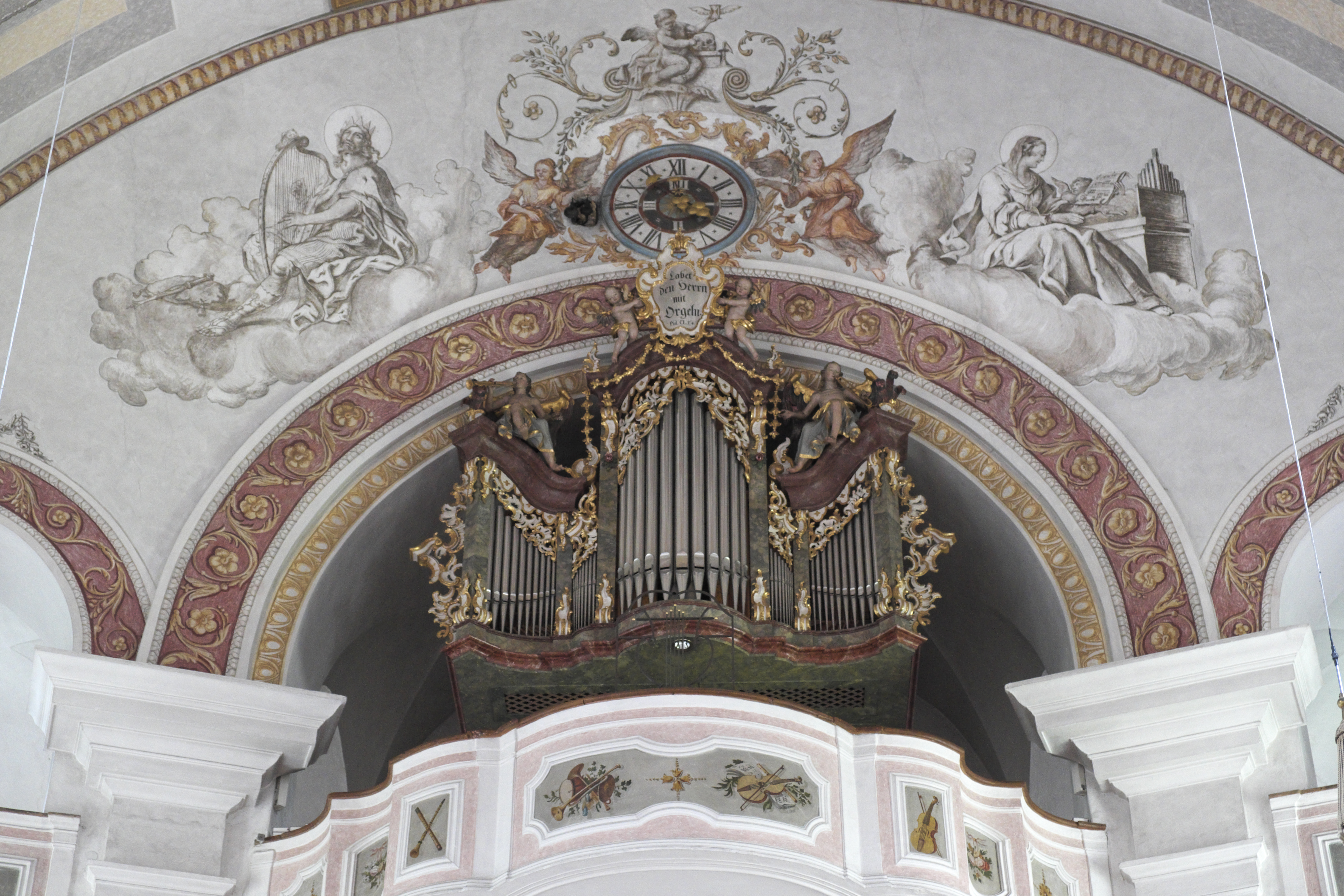 Katholische Pfarrkirche St. Georg in Ruhpolding im Landkreis Traunstein (Bayern/Deutschland), Orgelempore